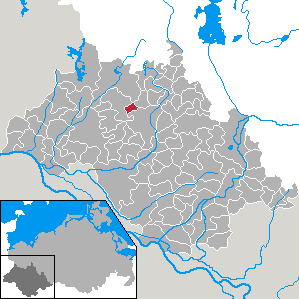 Bobzin in Mecklenburg-Vorpommern - district Ludwigslust